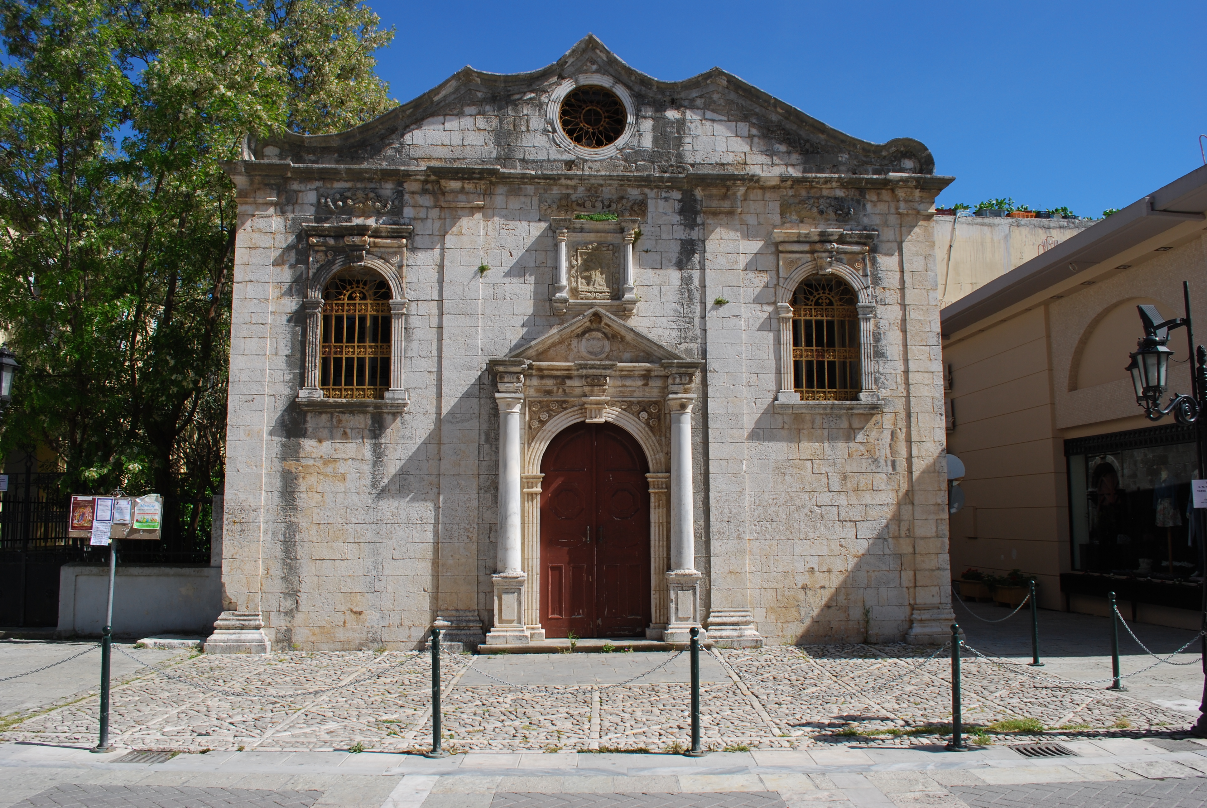 Vue de Lefkada.